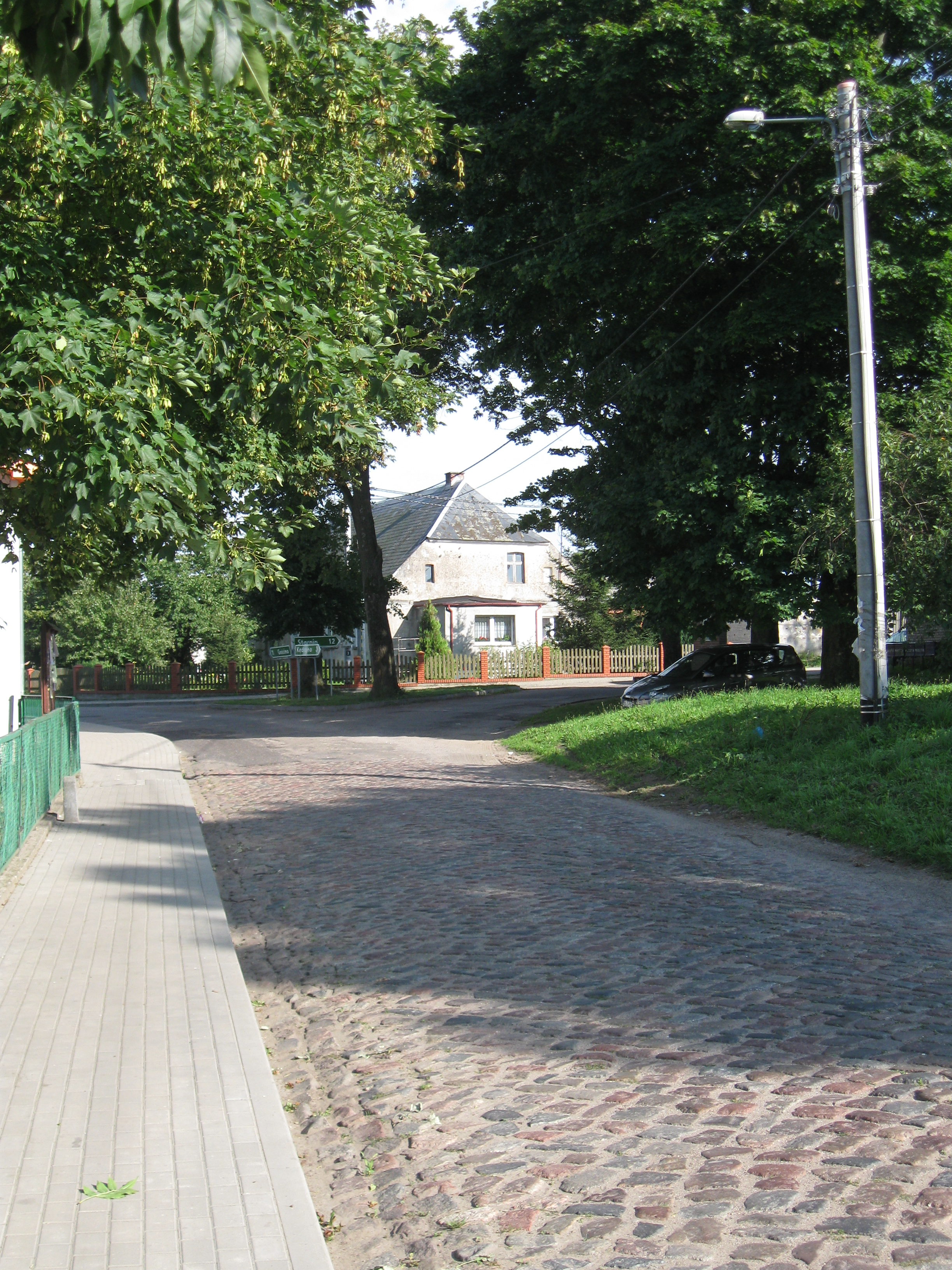 Centrum Byszewa - widoczna krzyżówka dróg ze Świecia Kołobrzeskiego, Gościna i Kędrzyna